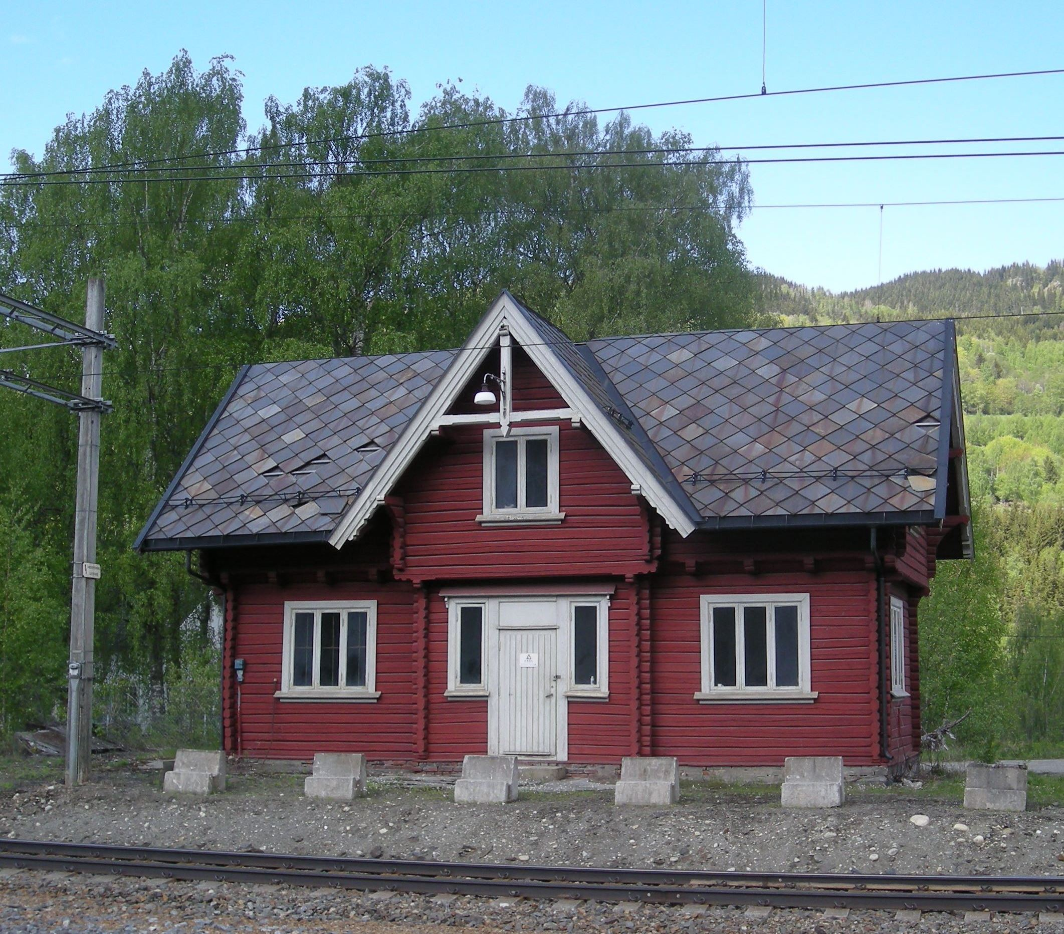 Ilgodshus på Fåberg stasjon